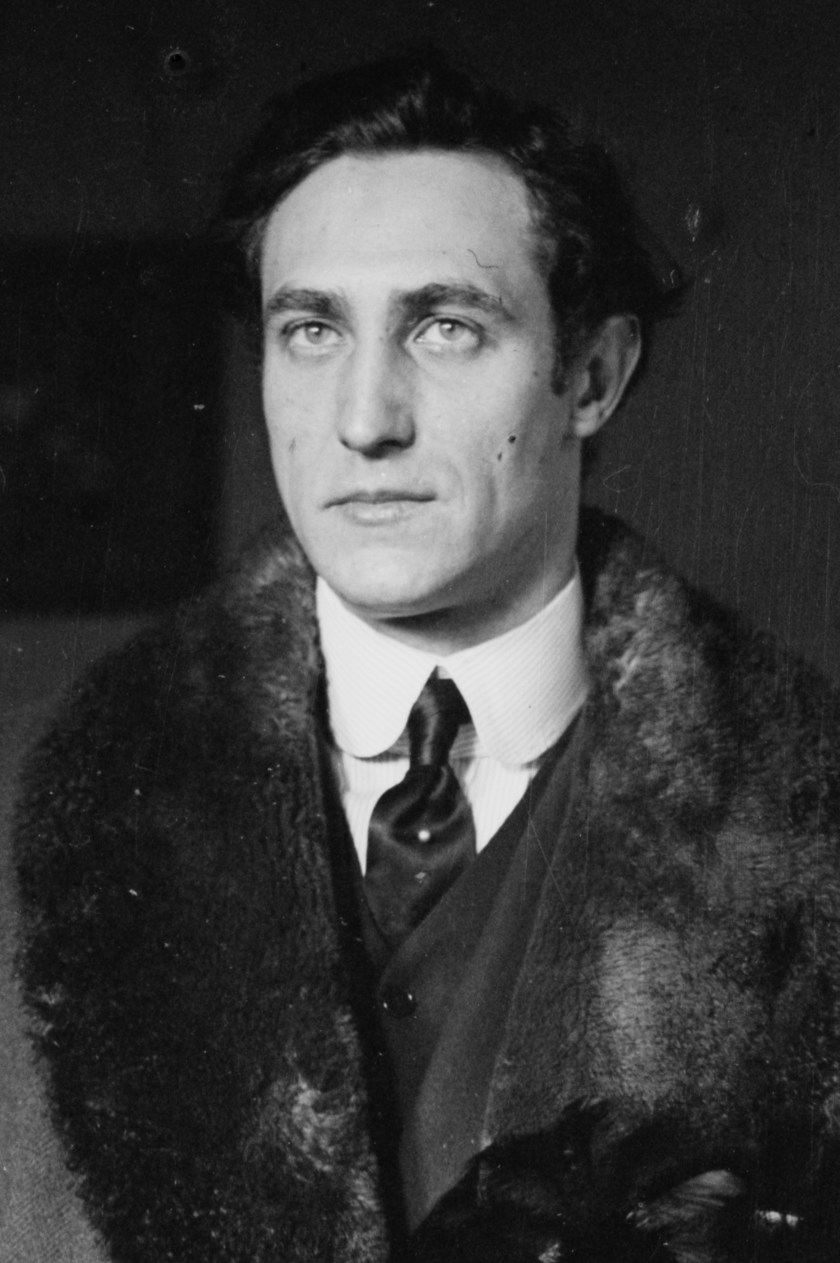 Actor Lou Tellegen